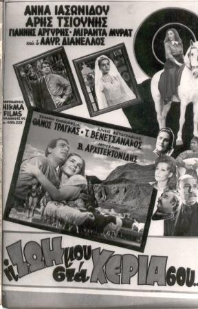 1971 :"Η ζωή μου στα χέρια σου", ,ηθογραφία, Σκηνοθεσία Θάνου Τράγκα.